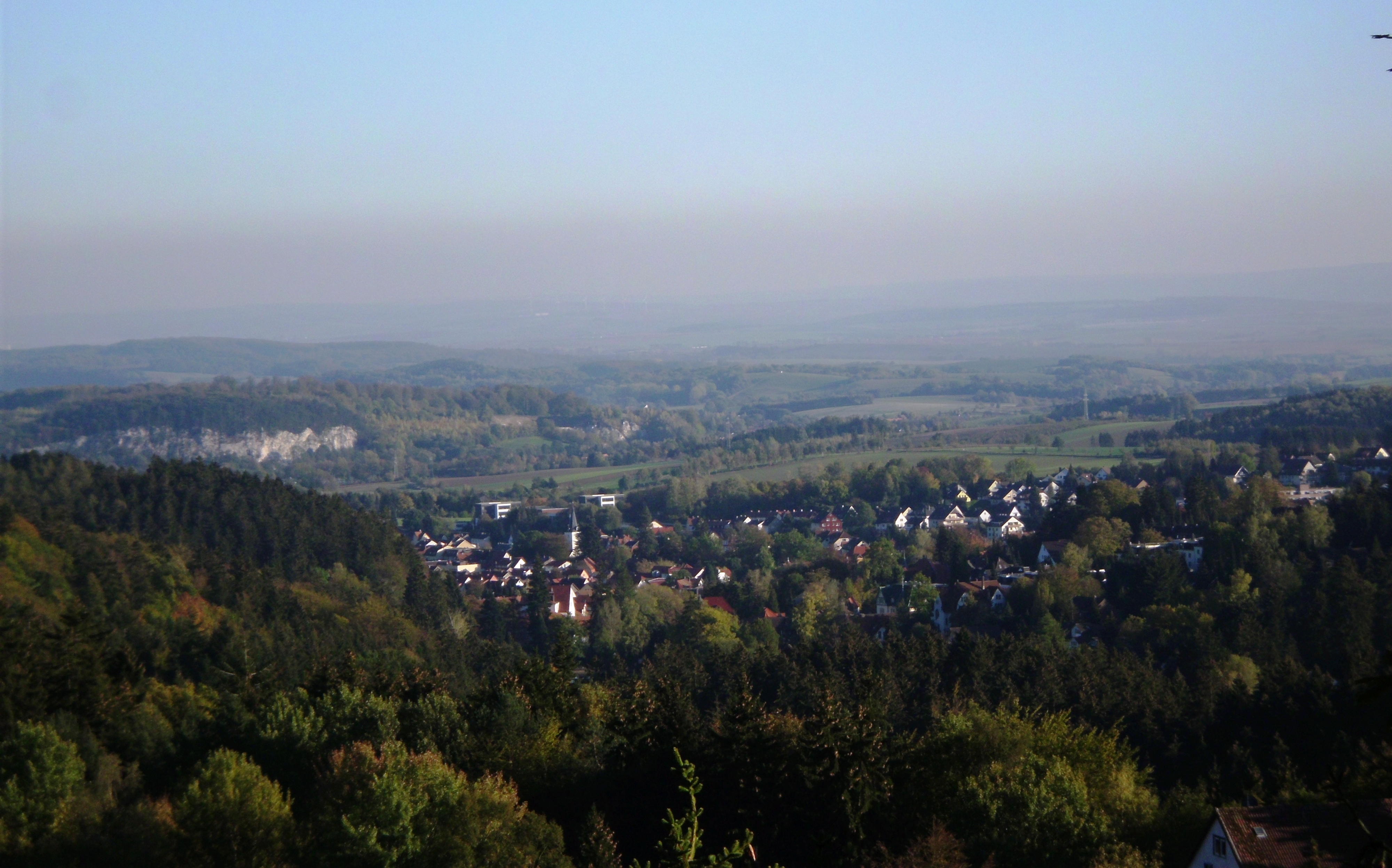 Aussicht vom Philippsgruß bei Bad Sachsa